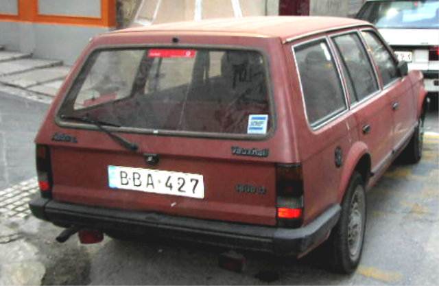 Vauxhall Astra D Estate